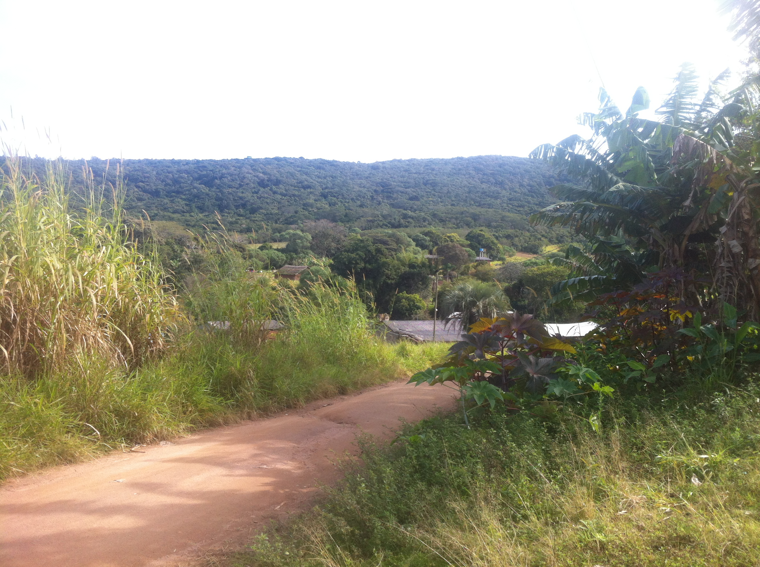 Estrada interna da Aldeia Guarany no Cantagalo em Porto Alegre.